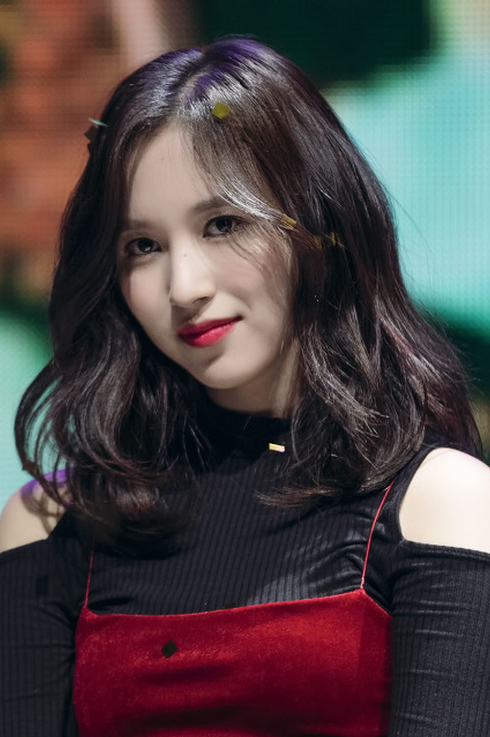 171030 트와이스 LIKEY 쇼케이스 미나 (2)